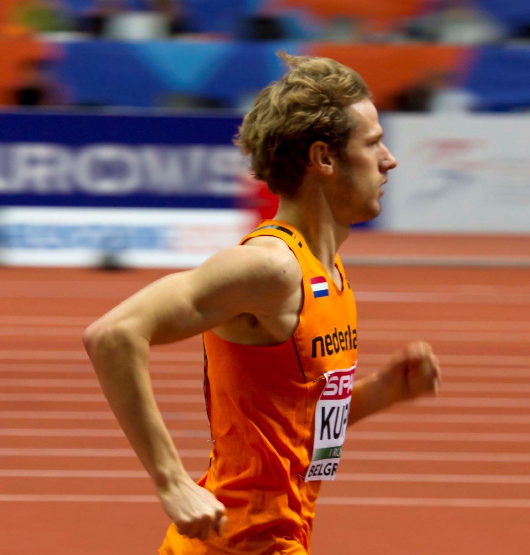 _071 800m reeksen kupers